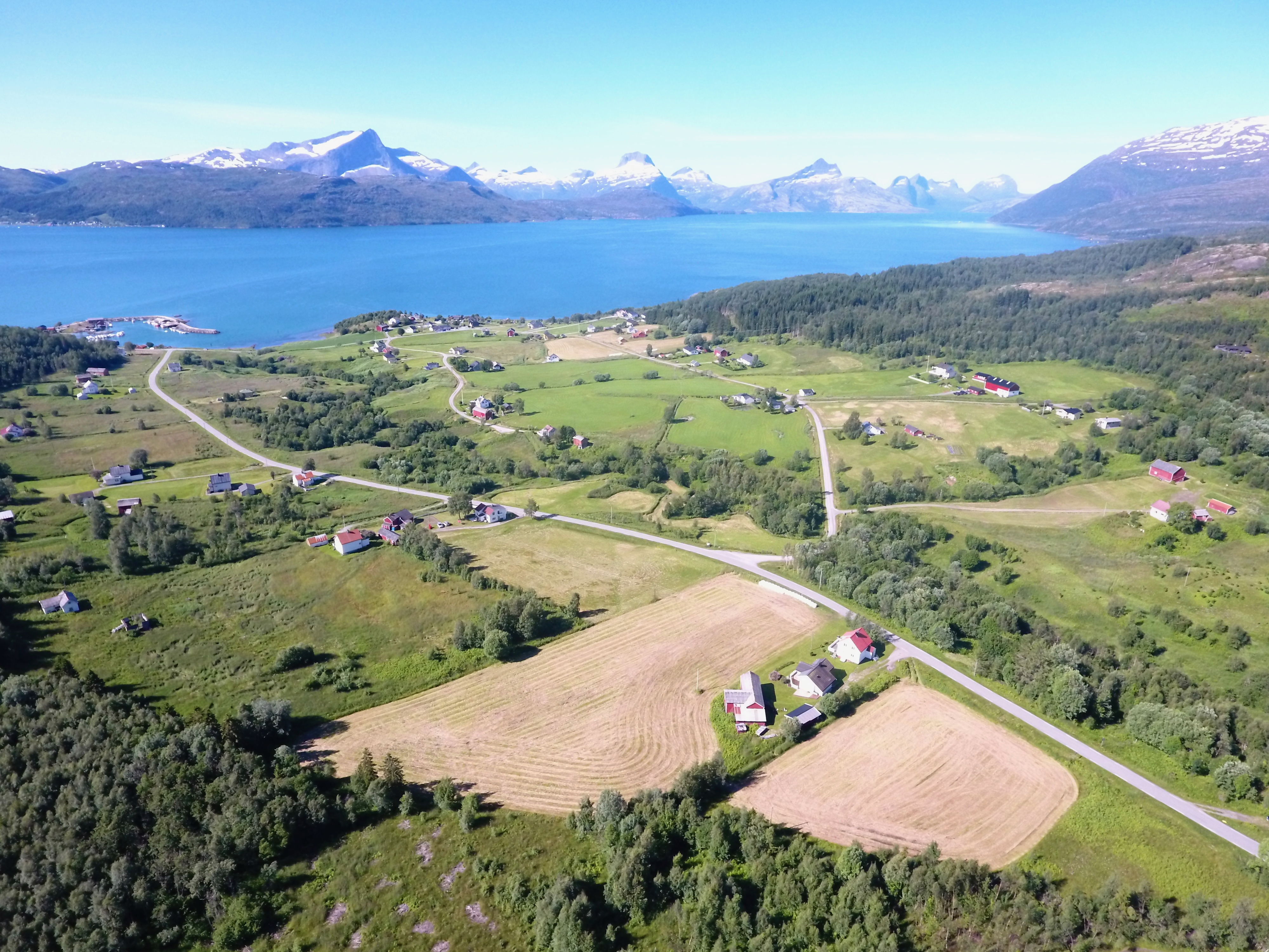 Dronefoto av Styrkesnes juli 2017